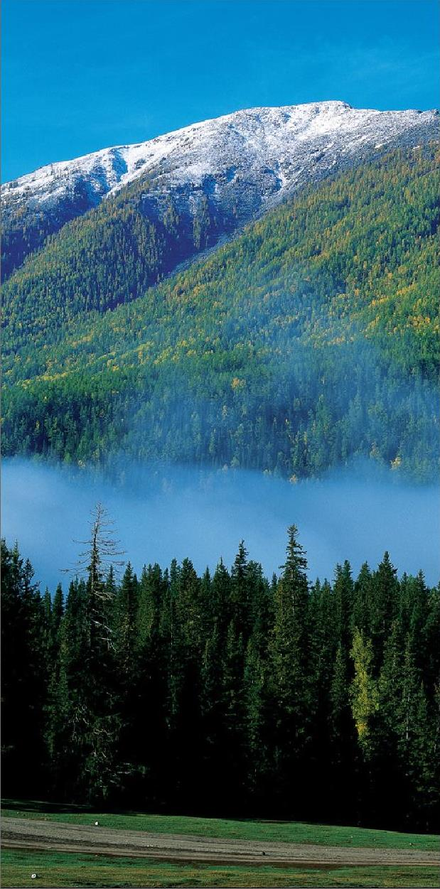 中文（中国大陆）: 天山垂直自然带分布